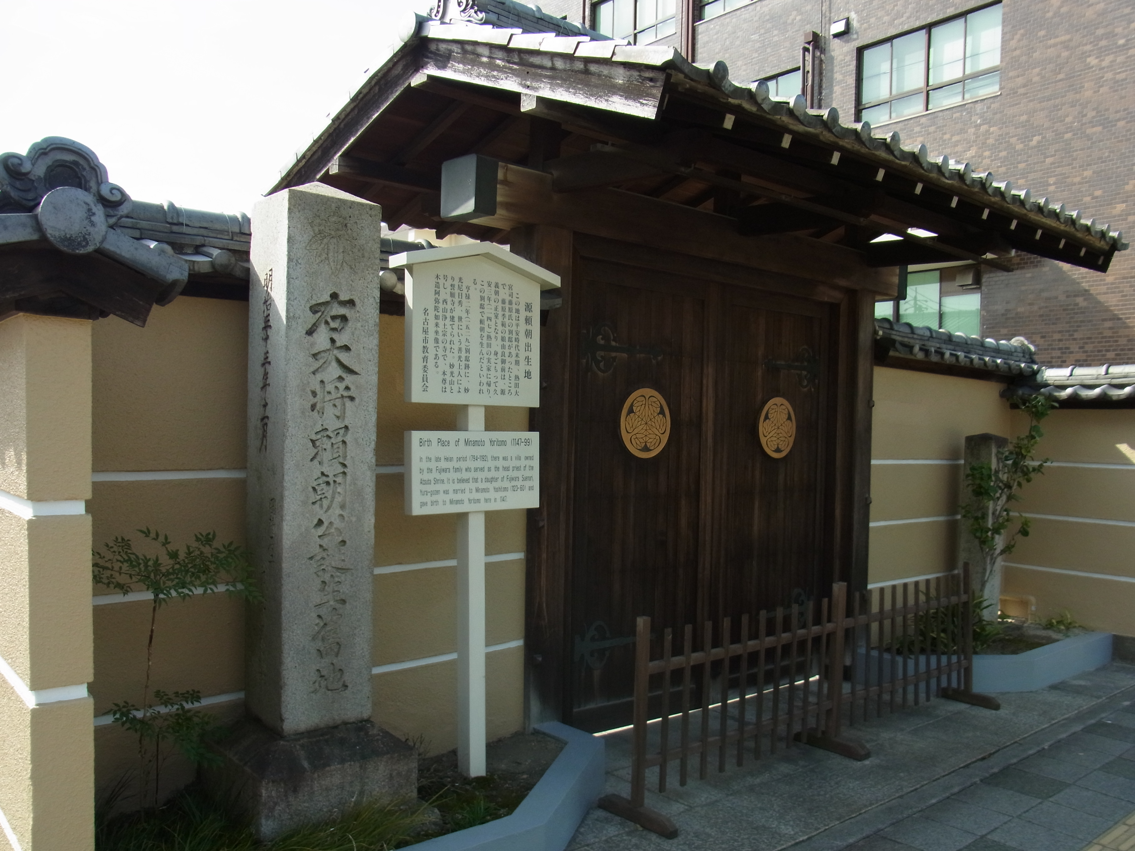 誓願寺山門